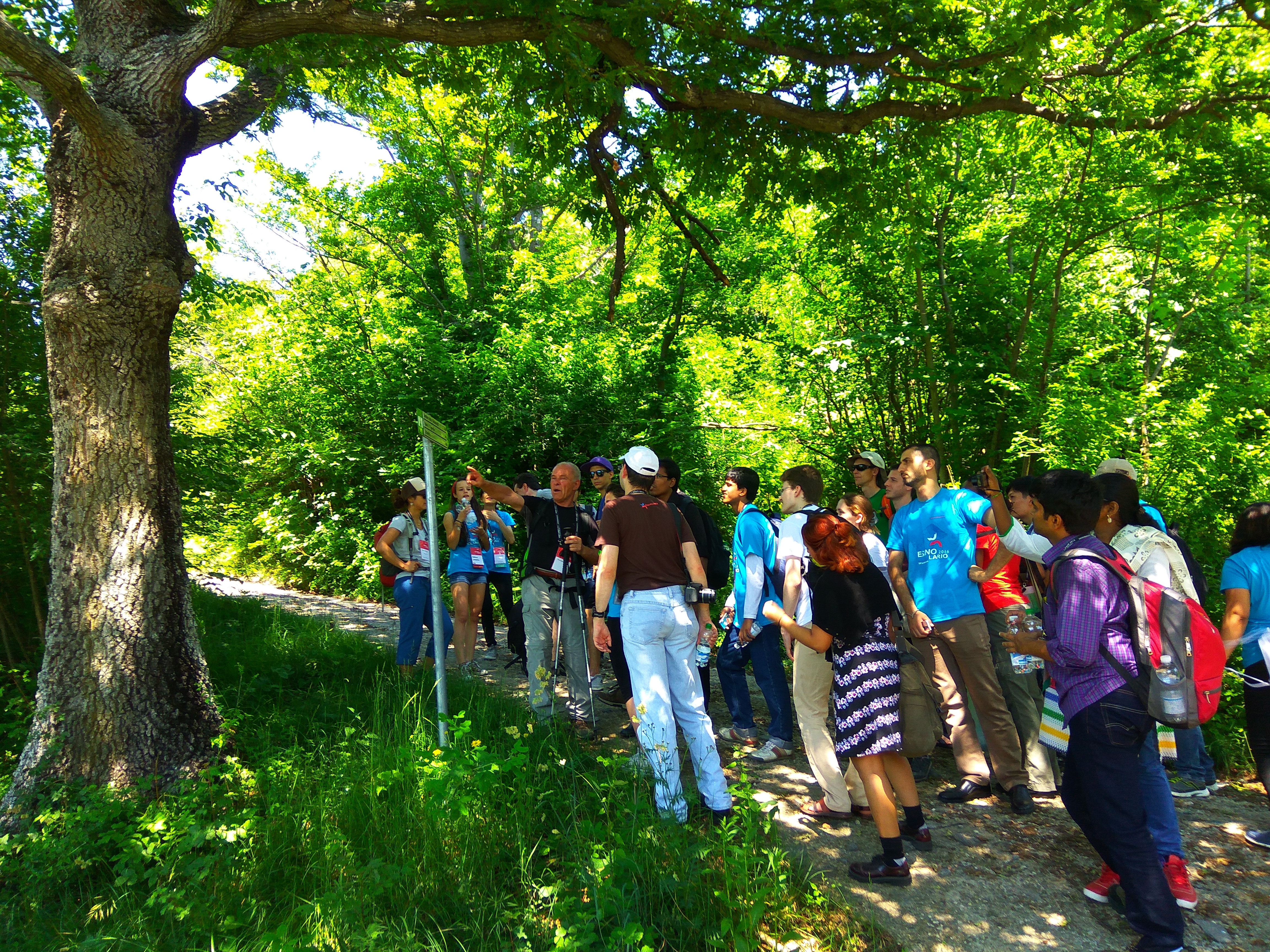 Сходження на гору San Defendente. Вікіманія 2016